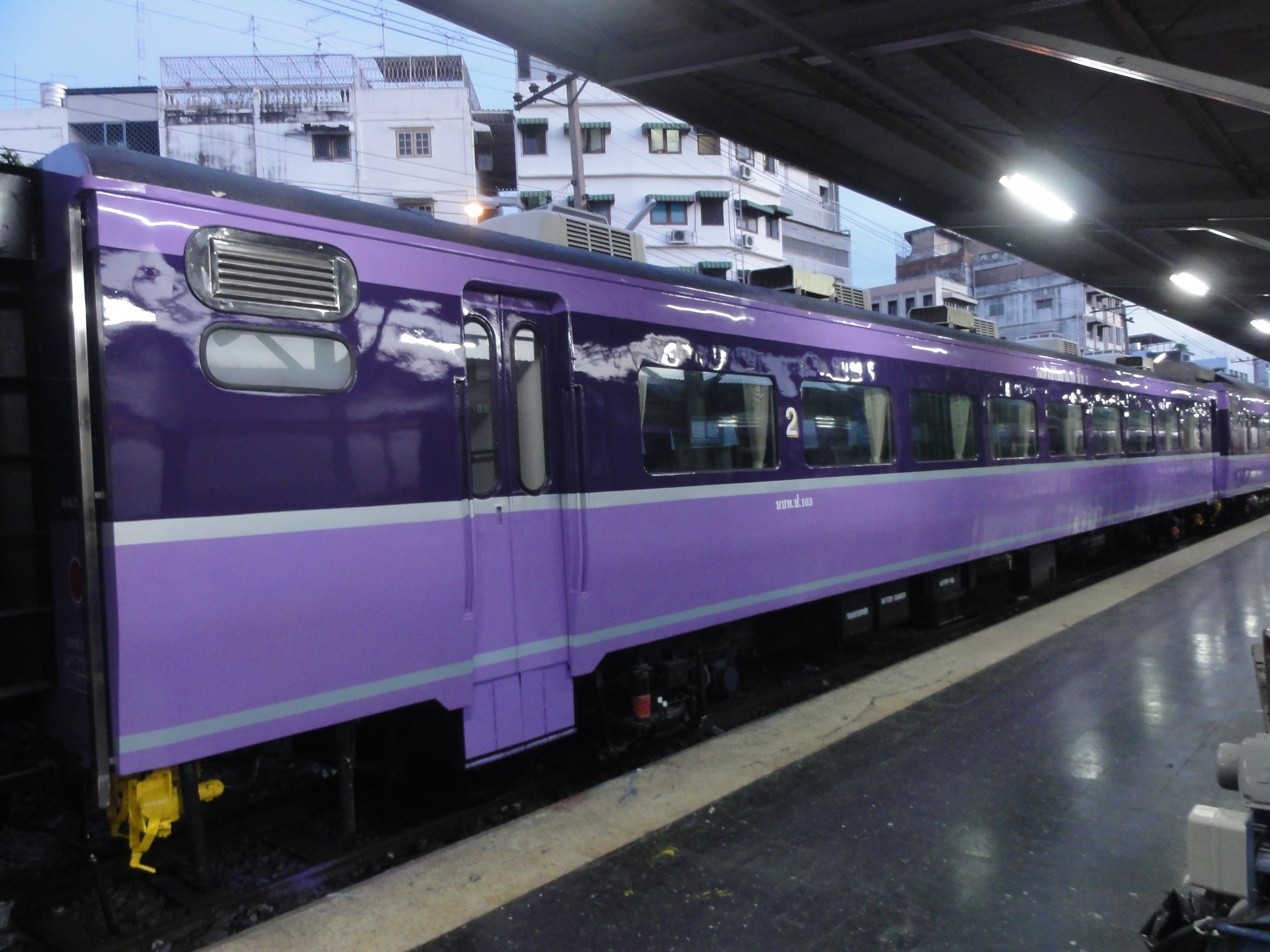 タイ国鉄に譲渡された国鉄14系客車 フワランポーン駅で撮影